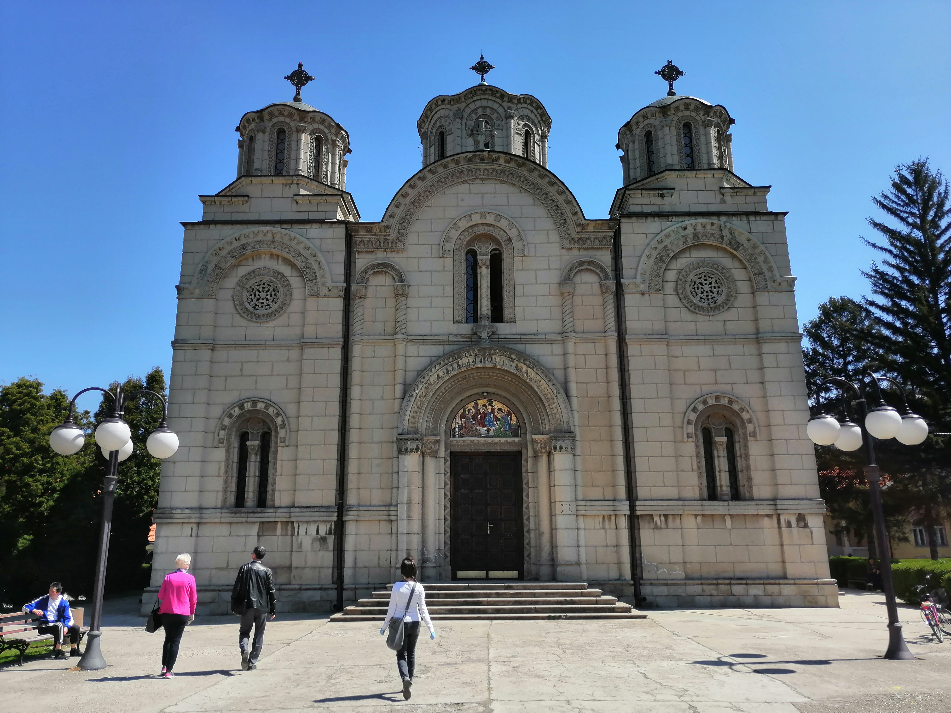 Srpski (latinica): Crkva Svete Trojice u Leskovcu